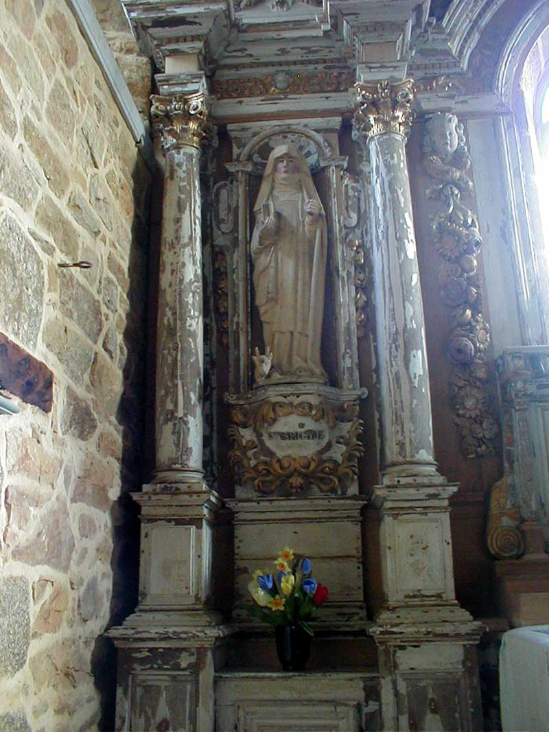 Berc'hed. Iliz. Delwenn Santez Berc'hed